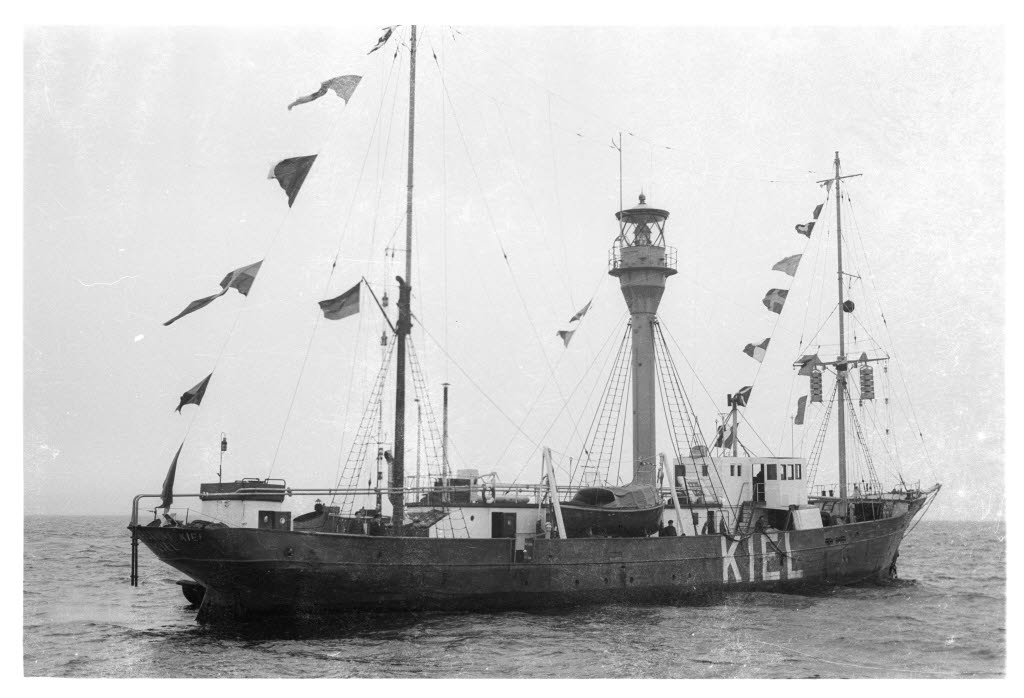 mit Flaggenschmuck.